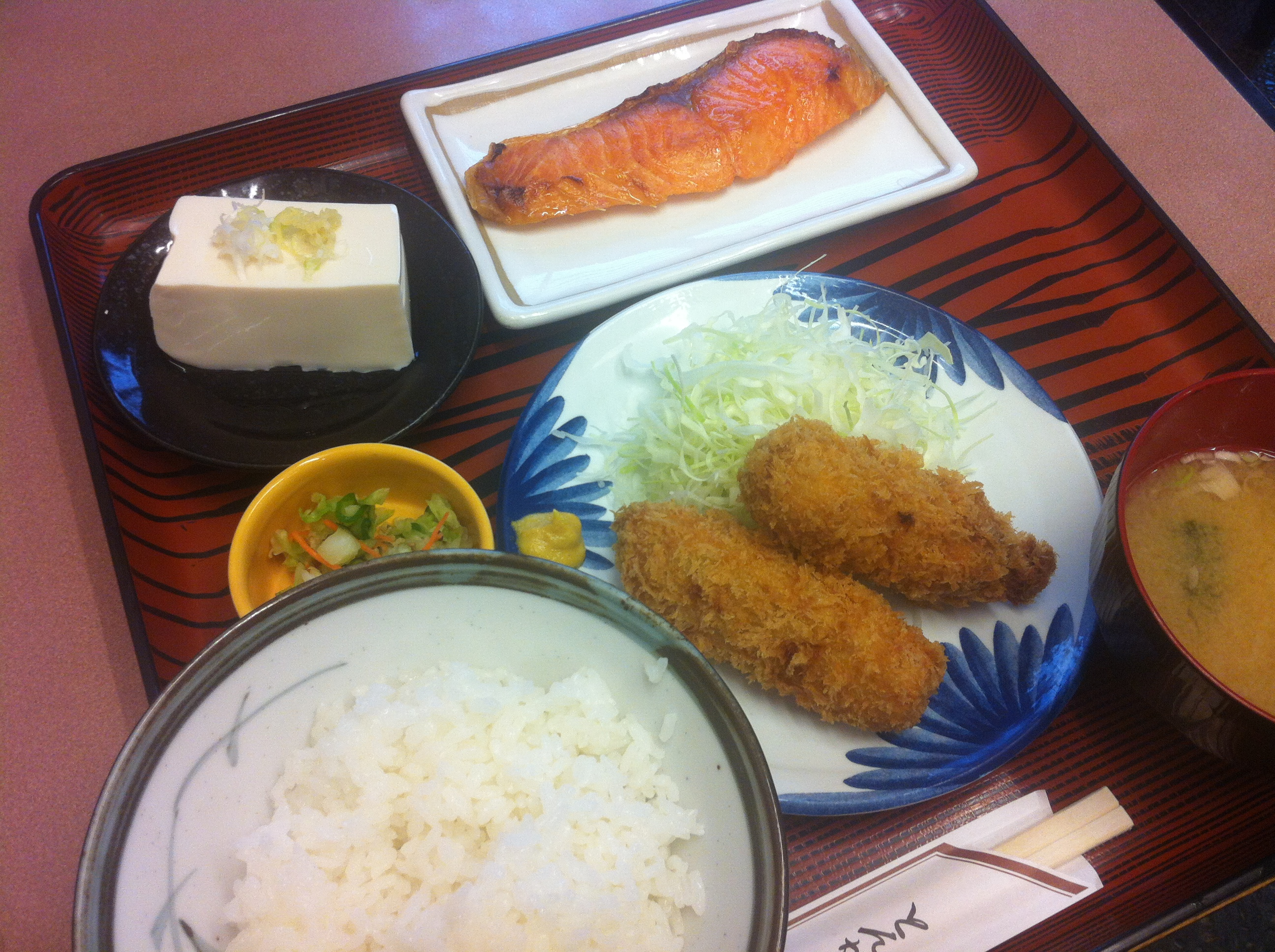 シャケの塩焼の定食 (780円) Salt grilled salmon teishoku (table d'hôte) (¥780)